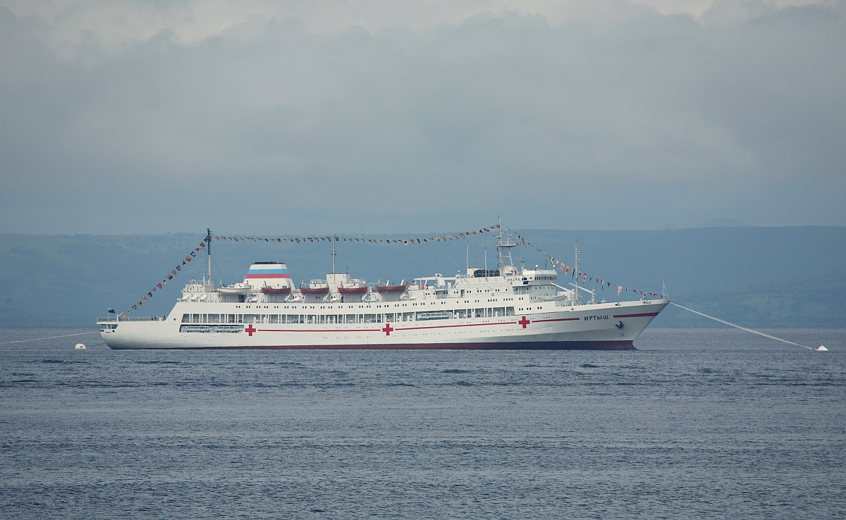 Иртыш. Парад ВМФ Владивосток 2008.07.25